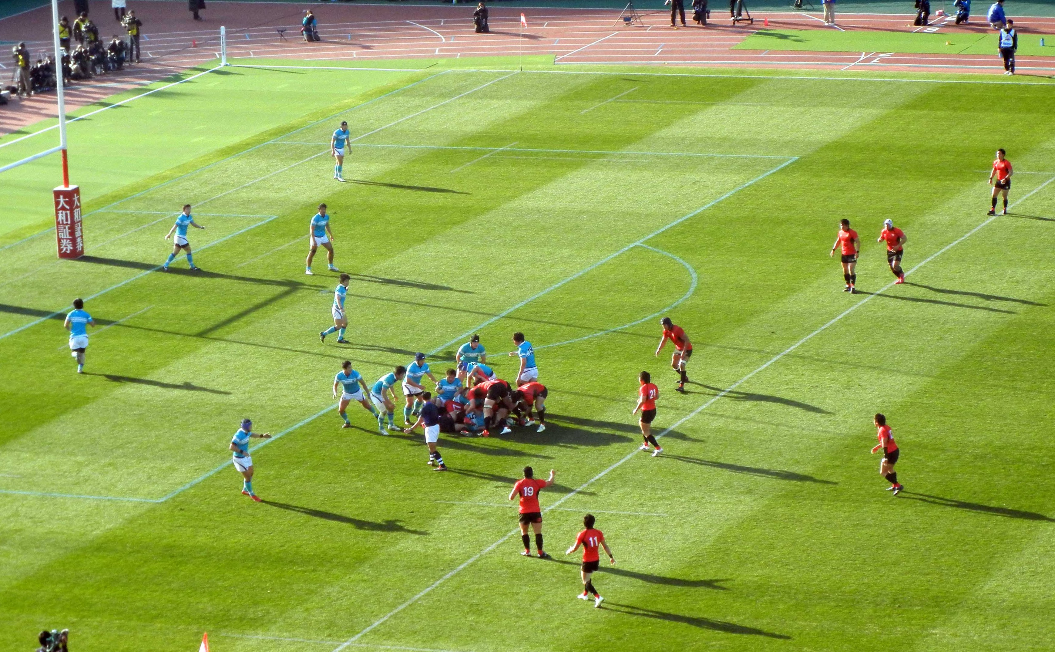 第49回大学ラグビー選手権 筑波対帝京